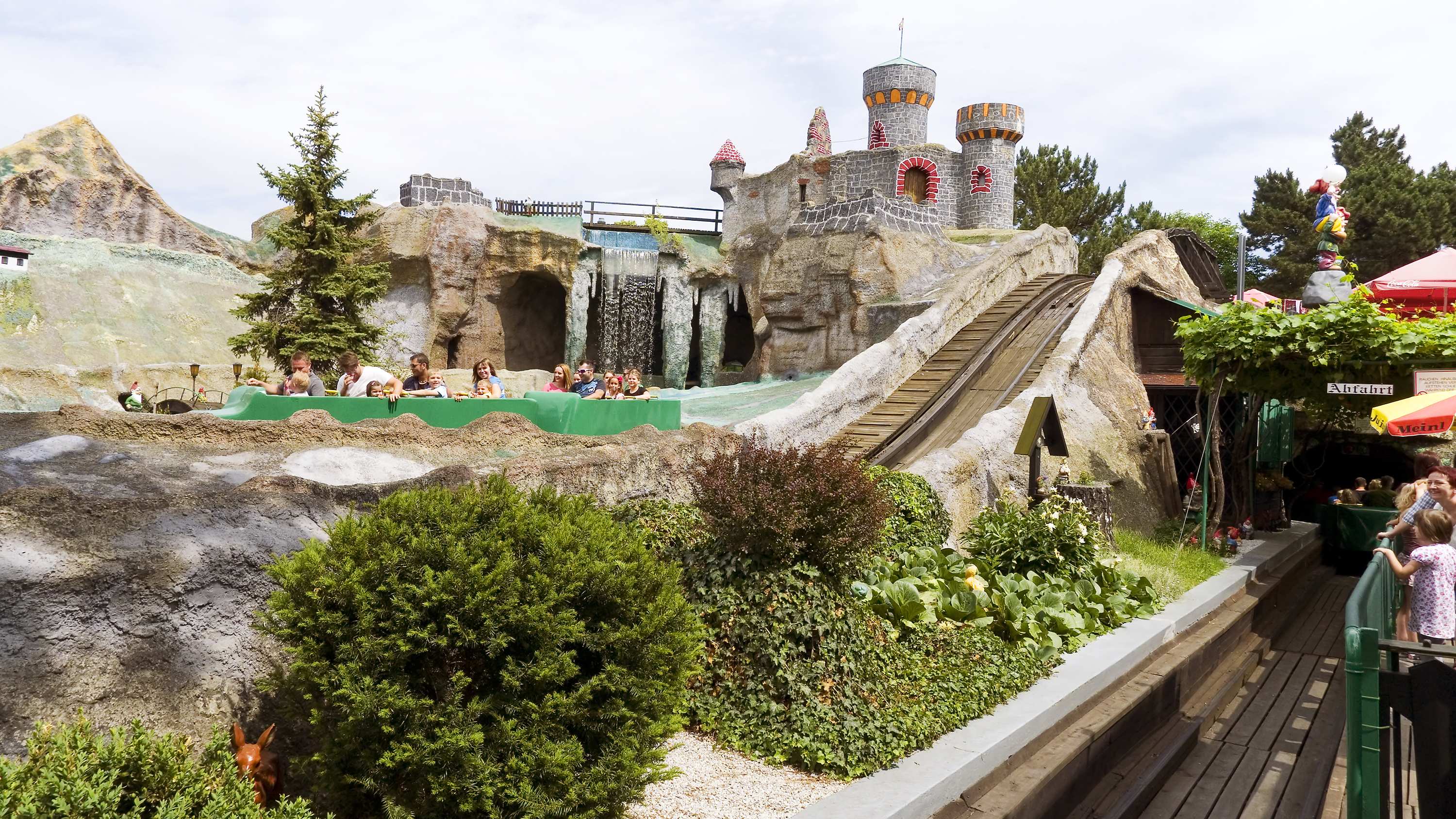 Achterbahn Hochschaubahn (Wiener Prater) in Wien 2, Leopoldstadt